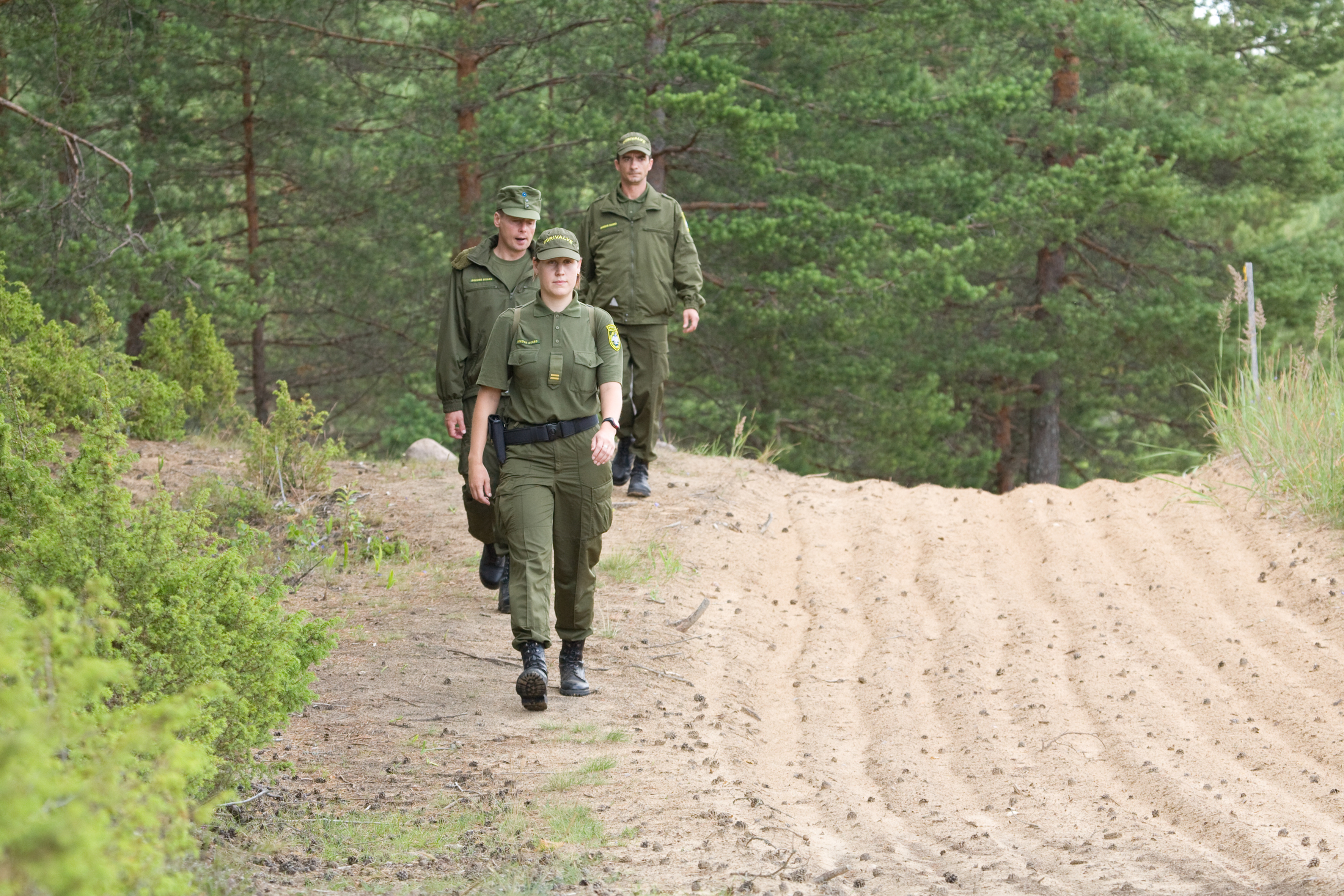 Jalgsi patrull Eesti Vabariigi ja Vene Föderatsiooni vahelisel kontrolljoonel.